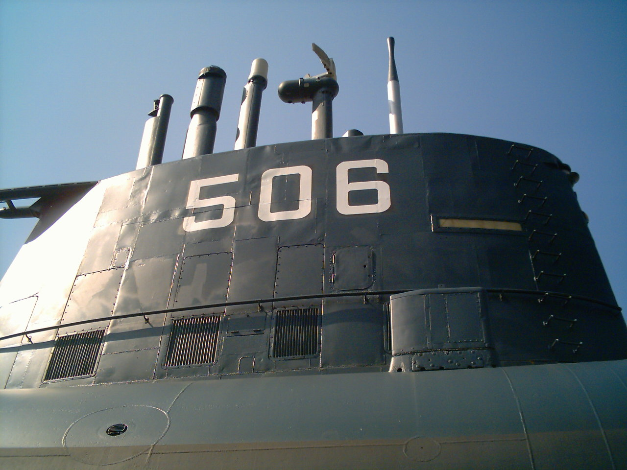 Particolare del numero di matricola del sommergibile Enrico Toti.